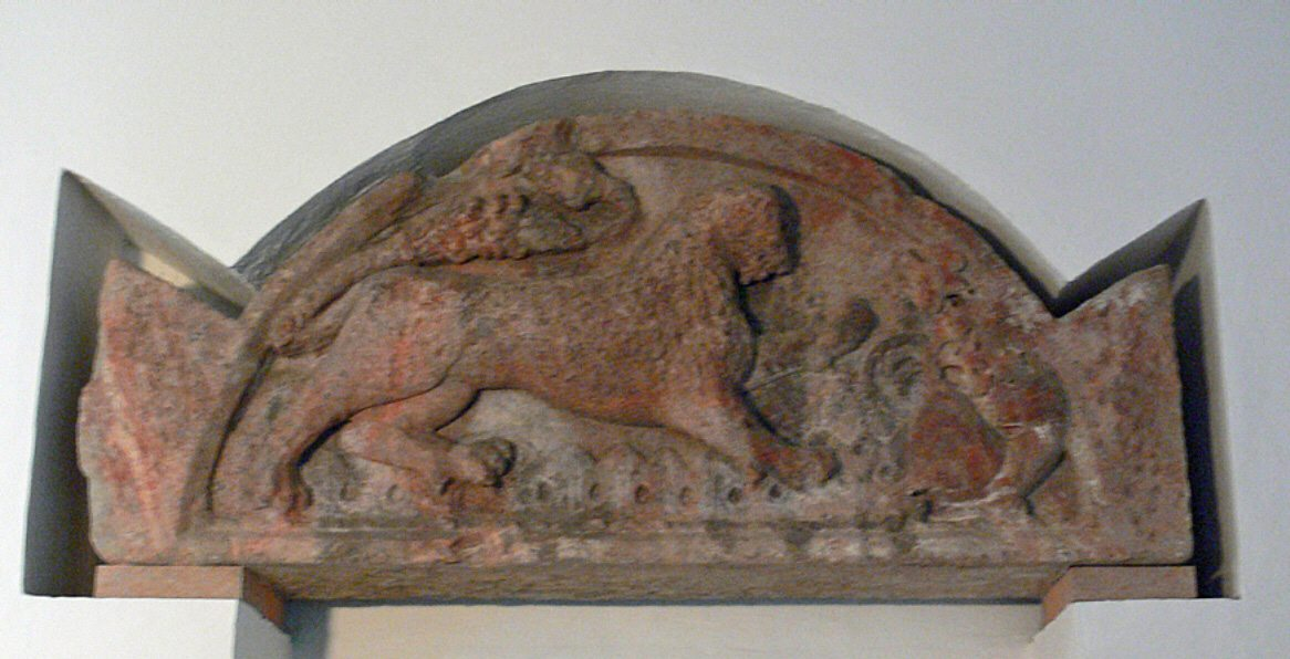 Tympanon mit Darstellung eines den Drachen bekämpfenden Löwen, um 1220/1230, Rochlitzer Porphyrtuff, aus der Schlosskapelle Lichtenwalde Kunstsammlungen Chemnitz, Schloßbergmuseum